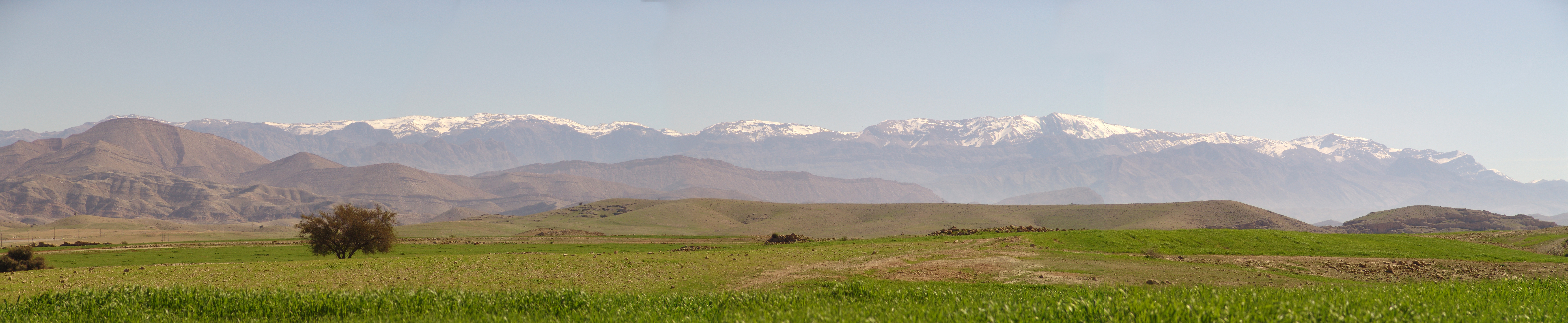 پانوراما از روستای دره‌اهوازی، هفتکل، خوزستان، ایران